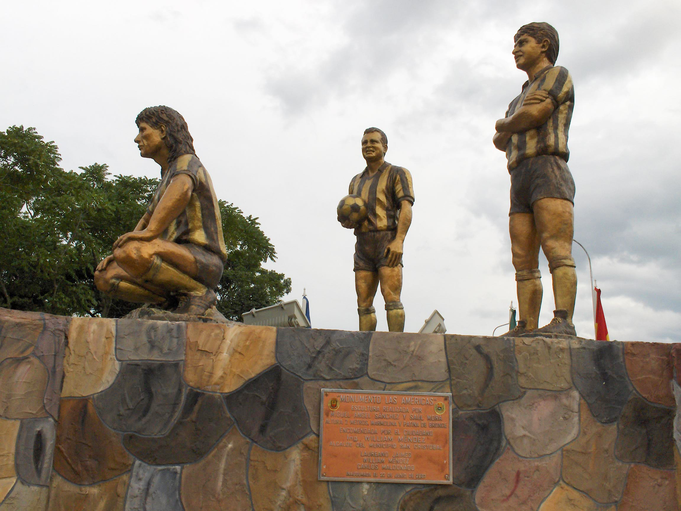 Conjunto escultórico Las Américas